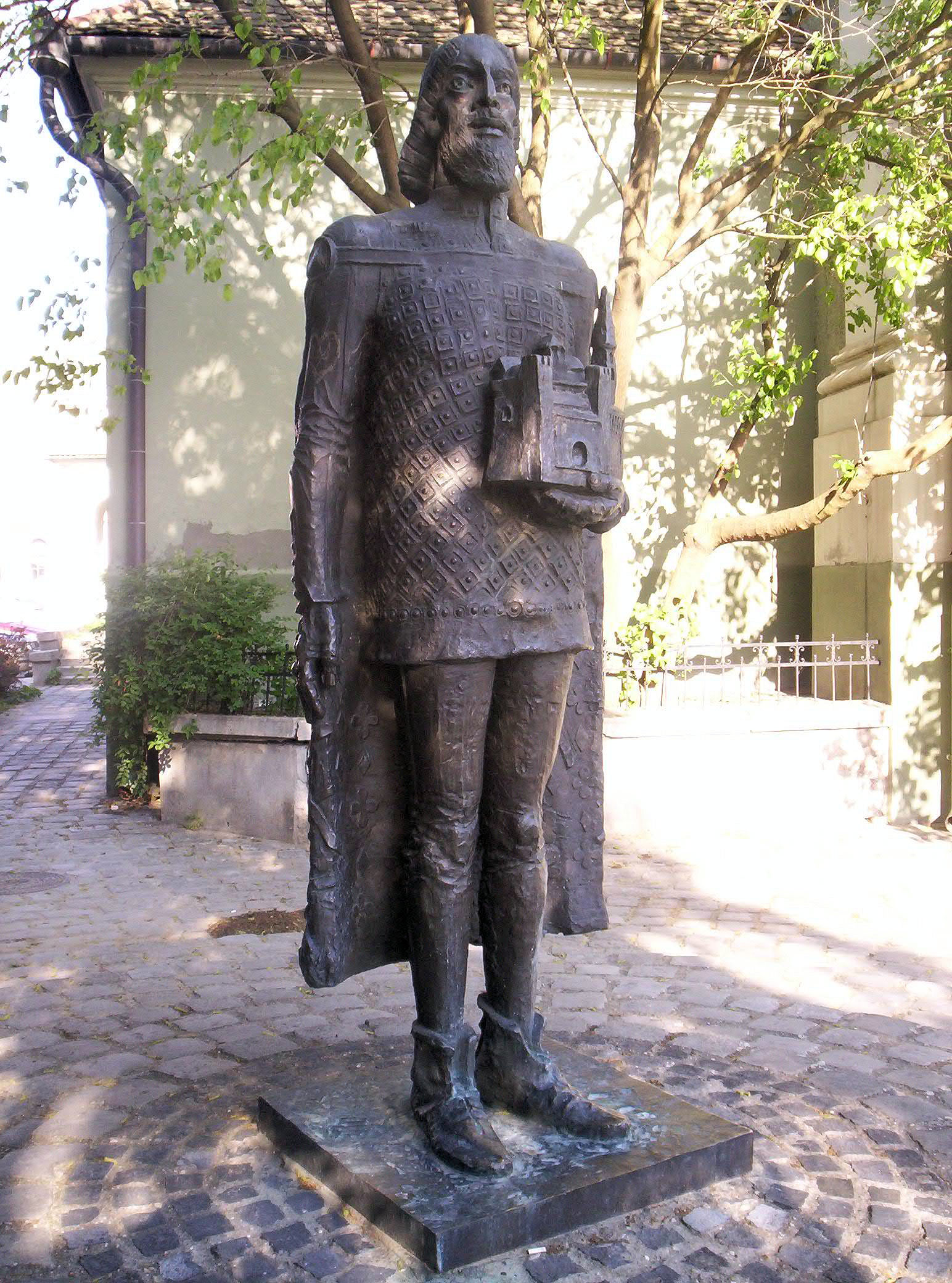 III. Béla szobra Baján, a III. Béla Gimnázium előtt. Kő Pál (1986) alkotása. – photo taken by uploader User:Csanády in 2006.